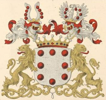 Stael von Holsteini parunivapp